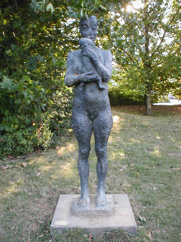 „Mutter und Kind“ von Sabina Grzimek (1981), Klinikum am Gesundbrunnen, Heilbronn